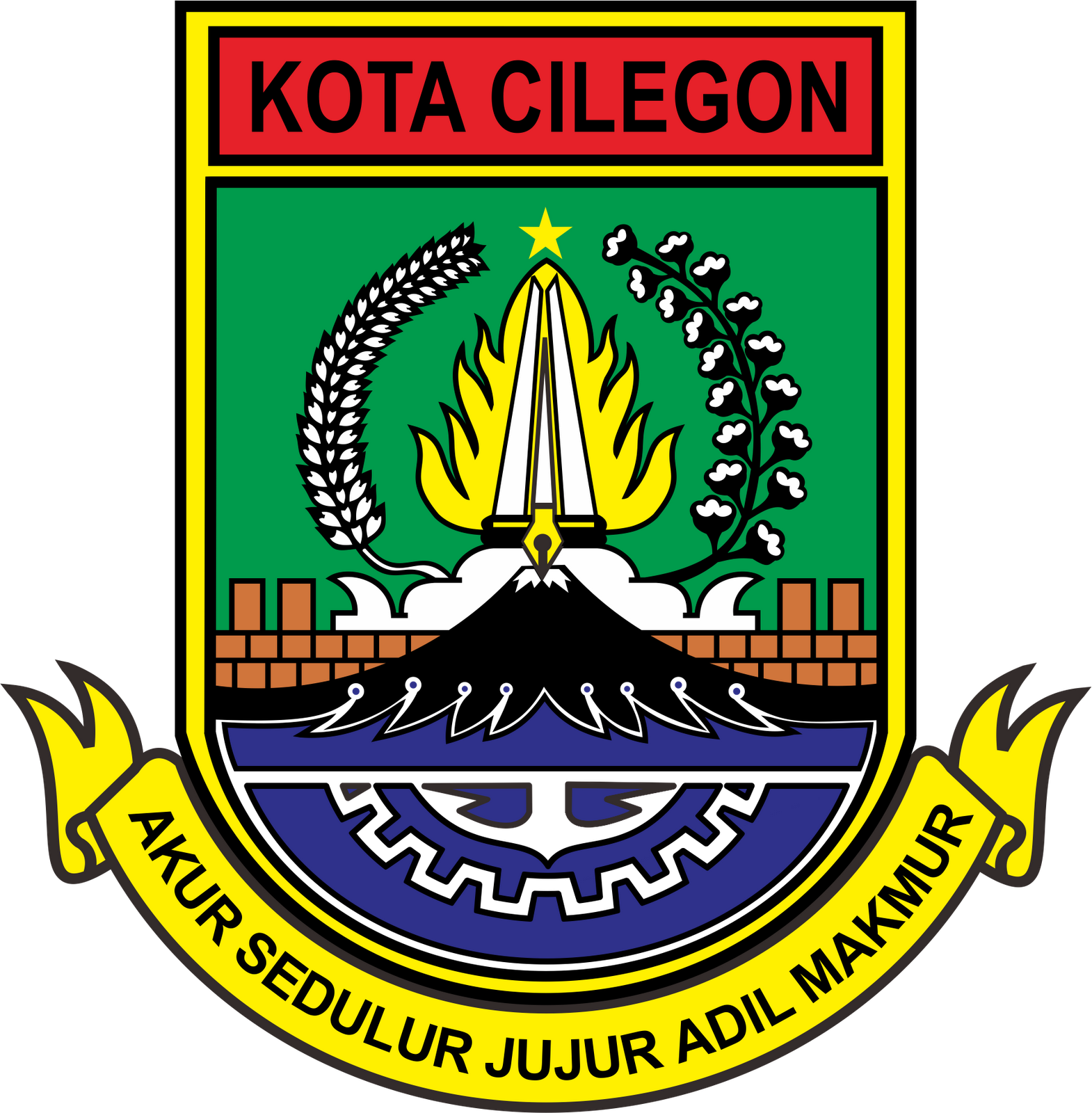 Lambang Kota Cilegon